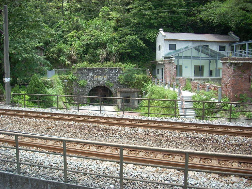 中文（台灣）: 猴硐煤礦博物園區與臺灣鐵路管理局宜蘭線。